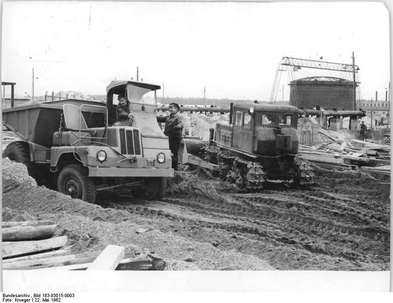 Zentralbild-Krueger 22.5.1962 Erdölverarbeitungswerk Schwedt-Oder. 2 Millionen Tonnen Erdöl pro Jahr werden nach Fertigstellung des Erdölverarbeitungswerkes Schwedt-Oder im Jahre 1964 verarbeitet werden. Die Bau- und Montagearbeiter dieser Großbaustelle des Siebenjahrplanes unternehmen z.Zt. alle Anstrengungen, den Termin (1.7.64) zu garantieren. UBz.: Die Gräben mit den Zuleitungsrohren werden zugeschüttet und das Gelände wieder planiert.